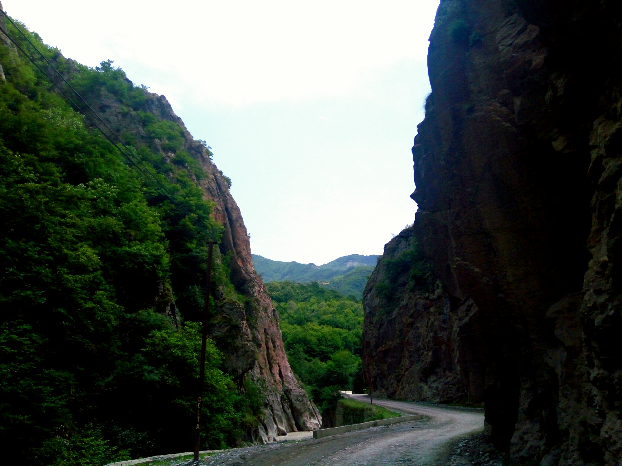 Azərbaycan, Quba, Xınalıq kəndidir.